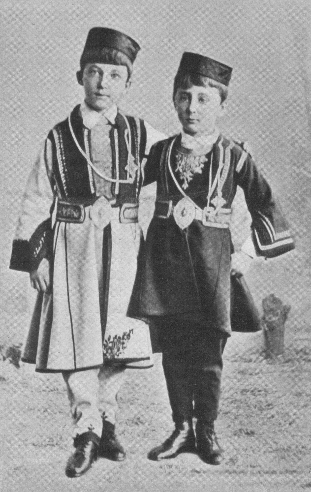 Boris III. von Bulgarien (1894-1943) und sein Bruder Kyrill (1895-1945).